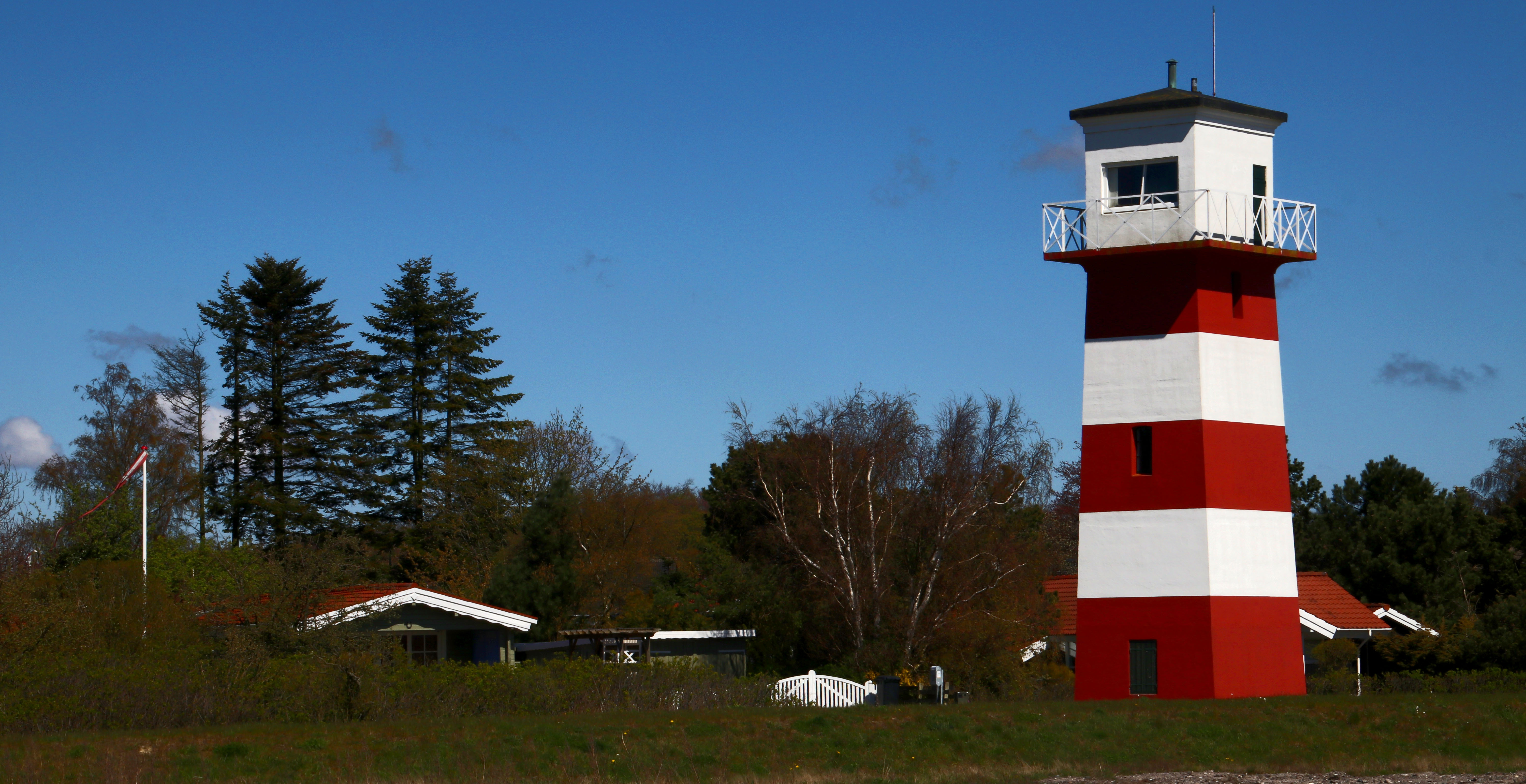 Vordingborg. På Ore Strand.